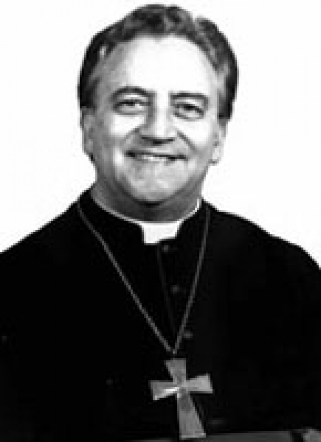 domromeu